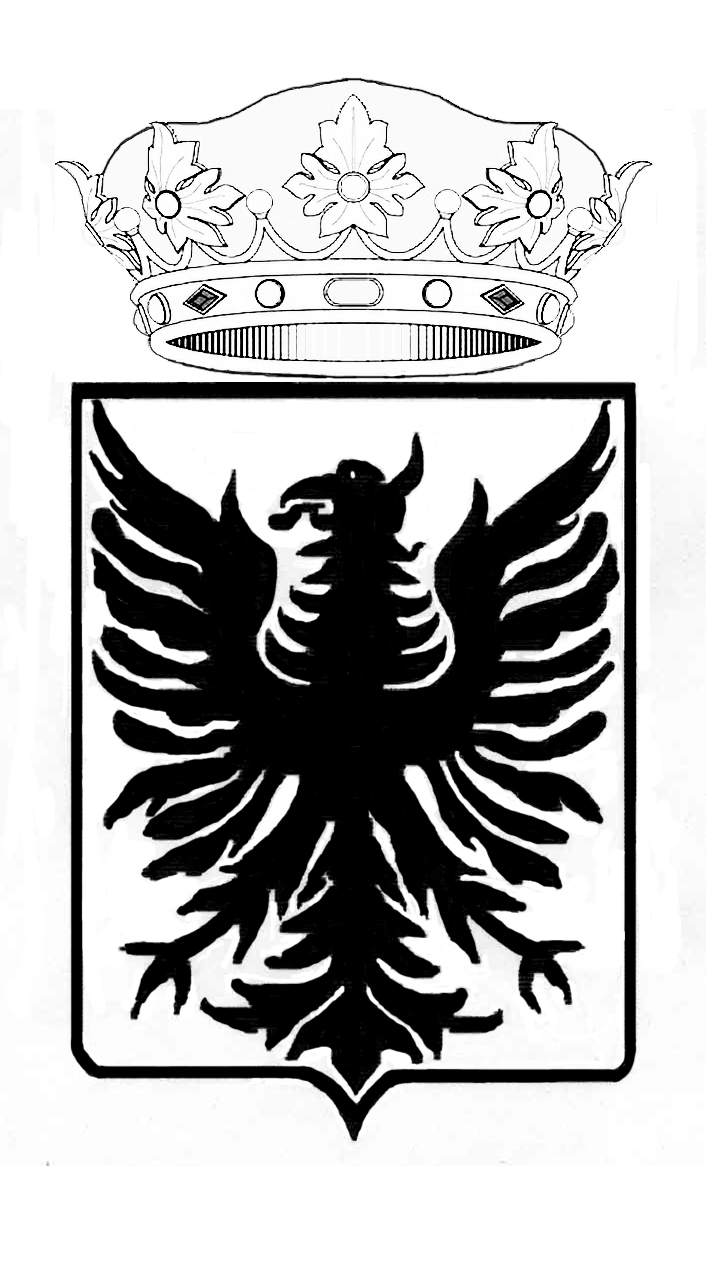 Escudo del Conde de Campo Alange, Francisco de Borja Castellano y Salamanca